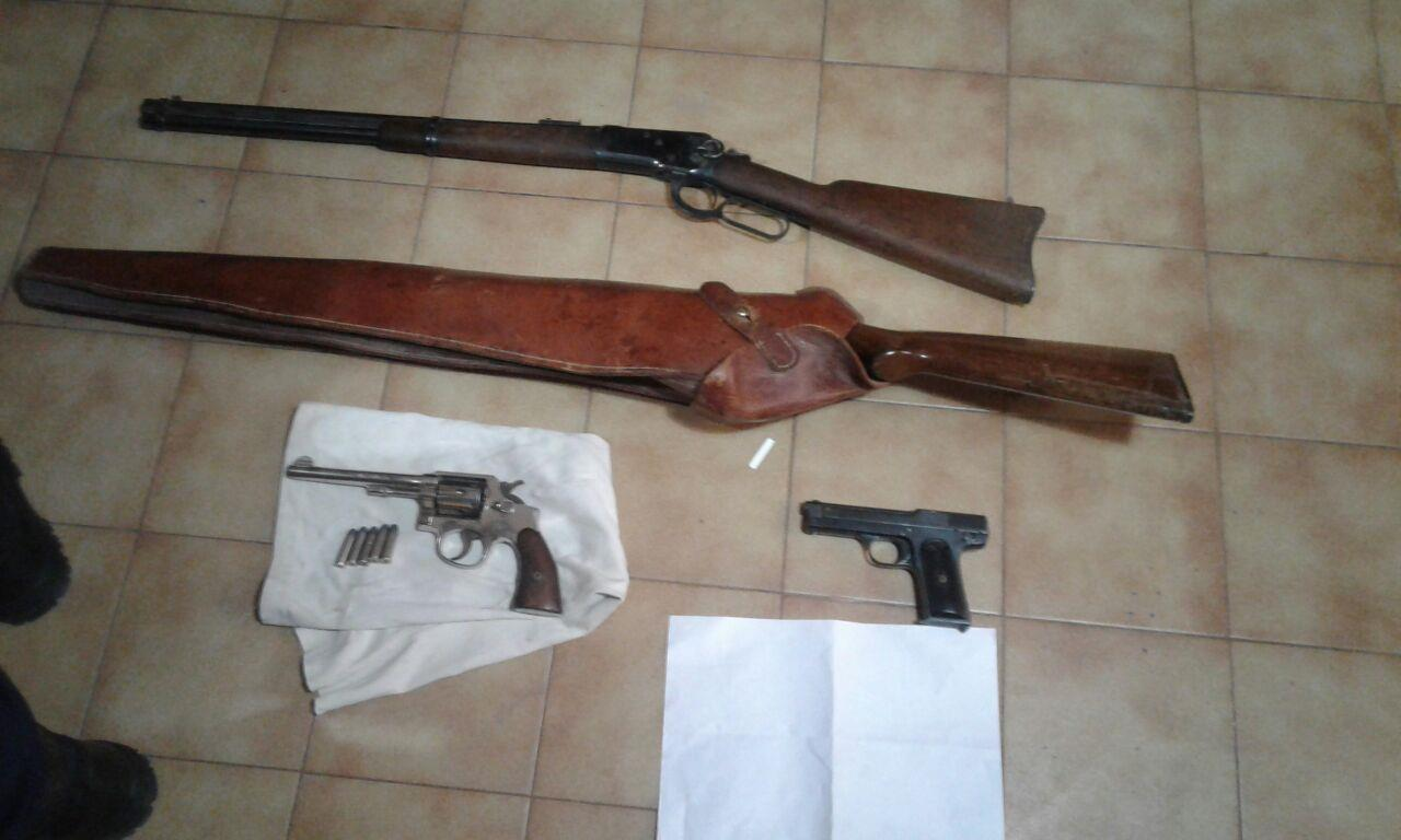 ELEMENTOS ENCONTRADOS EN ALLANAMIENTOS REALIZADOS EN EL MARCO DE LOS ATENTADOS INCENDIARIOS EN POZOS PETROLEROS Y EN LA CONCESIONARIA KUMENIA. NOVIEMBRE 2017.